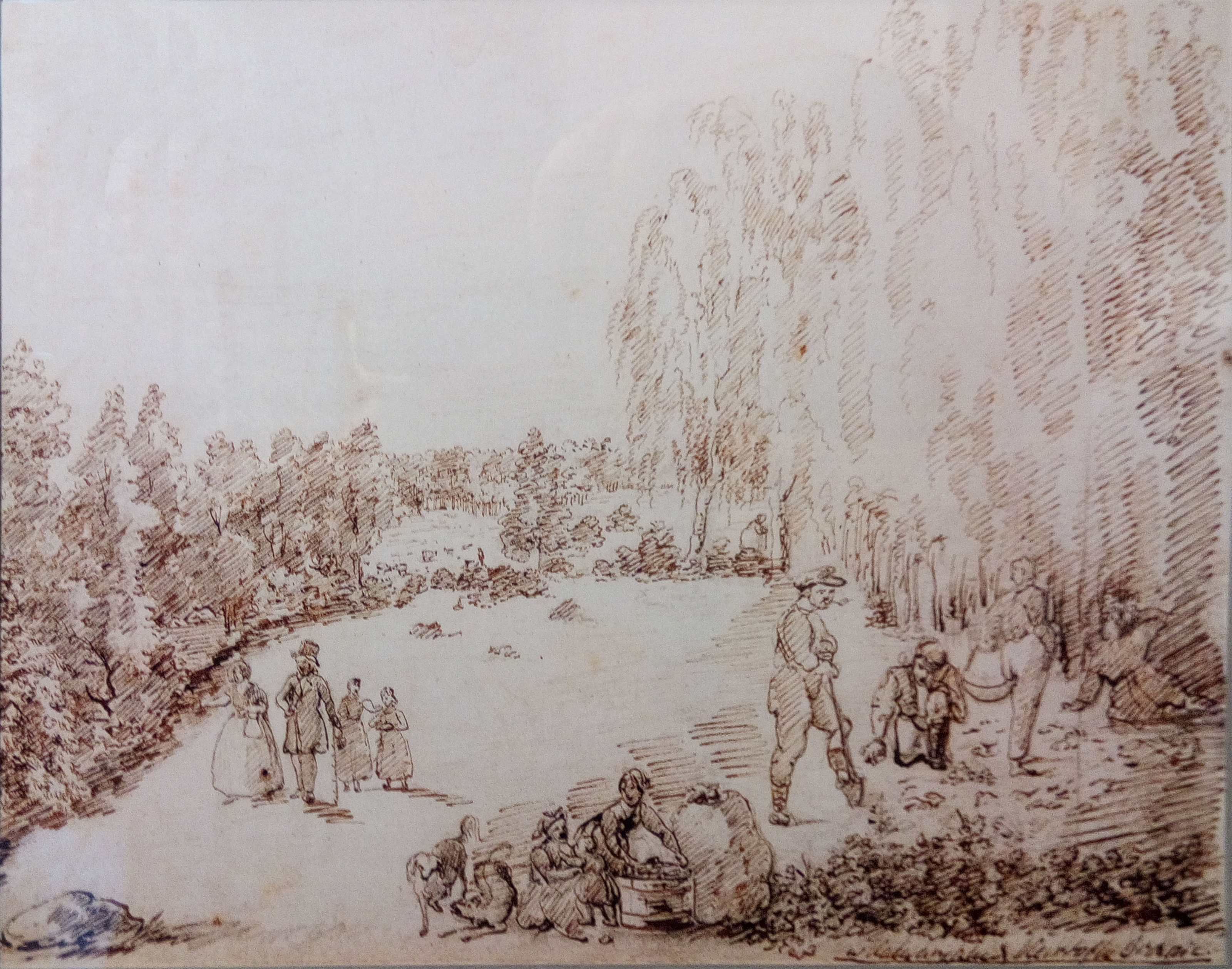 Беларуская (тарашкевіца): Менск (Miensk), Кальварышкі (Kalvaryški). Выбіраньне бульбы